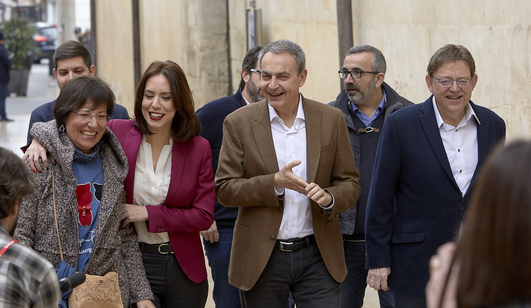 Pepa Frau, Diana Morant, Zapatero y Ximo Puig en el acto de presentación de la candidata a la alcaldía de Gandia, Diana Morant.